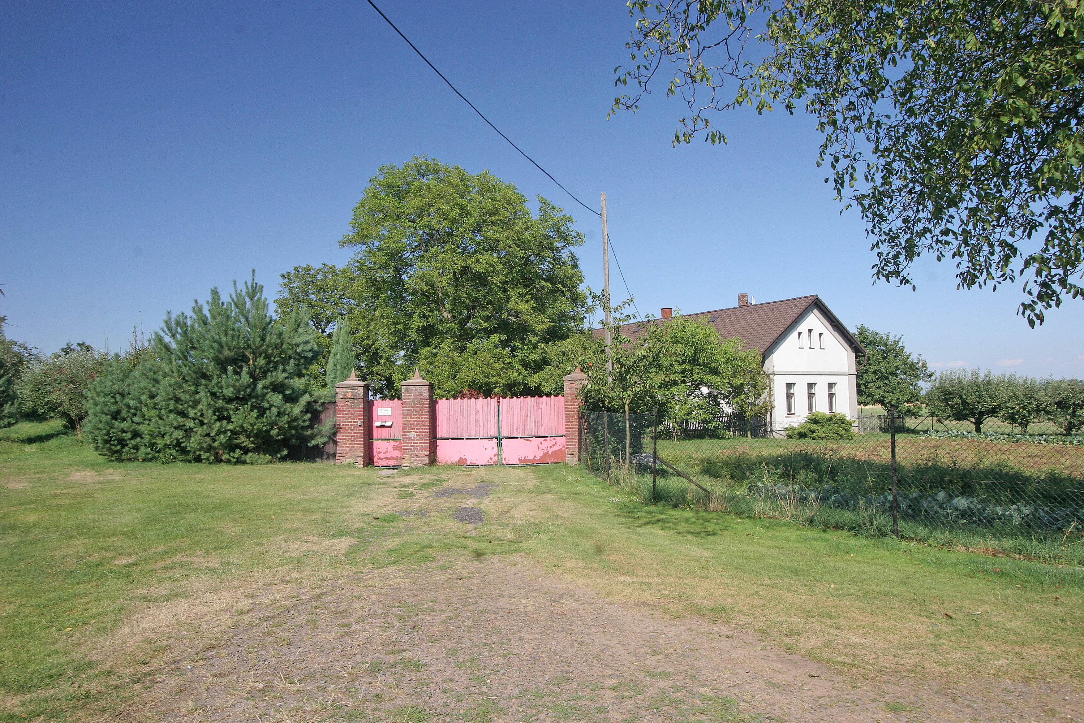 Charbuzice čp. 6